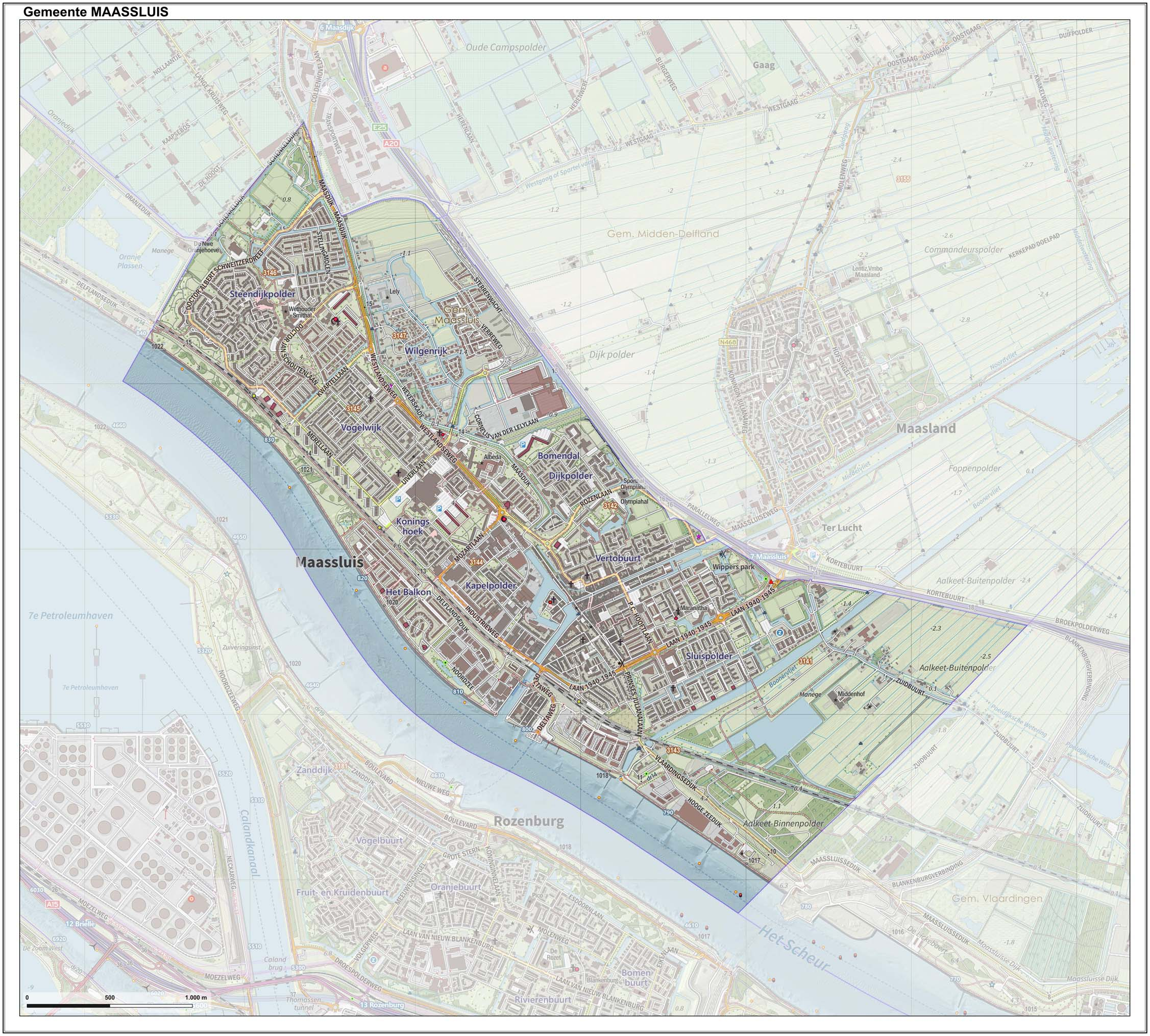 Topografische gemeentekaart. Resolutie: 400 pixels/km. Kaartbeeld samengesteld uit de open geodata van de Top10NL en Top25namen (Kadaster), Creative Commons-BY licentie. Gebouwvlakken uit open geodata BAG extract. Wegen uit de OpenStreetMap, OpenStreetMap community. Reliëfschaduw uit de Actuele Hoogtekaart AHN2. Samenstelling en kleurenschema: Jan-Willem van Aalst, met QGIS. Zie ook de Legenda.